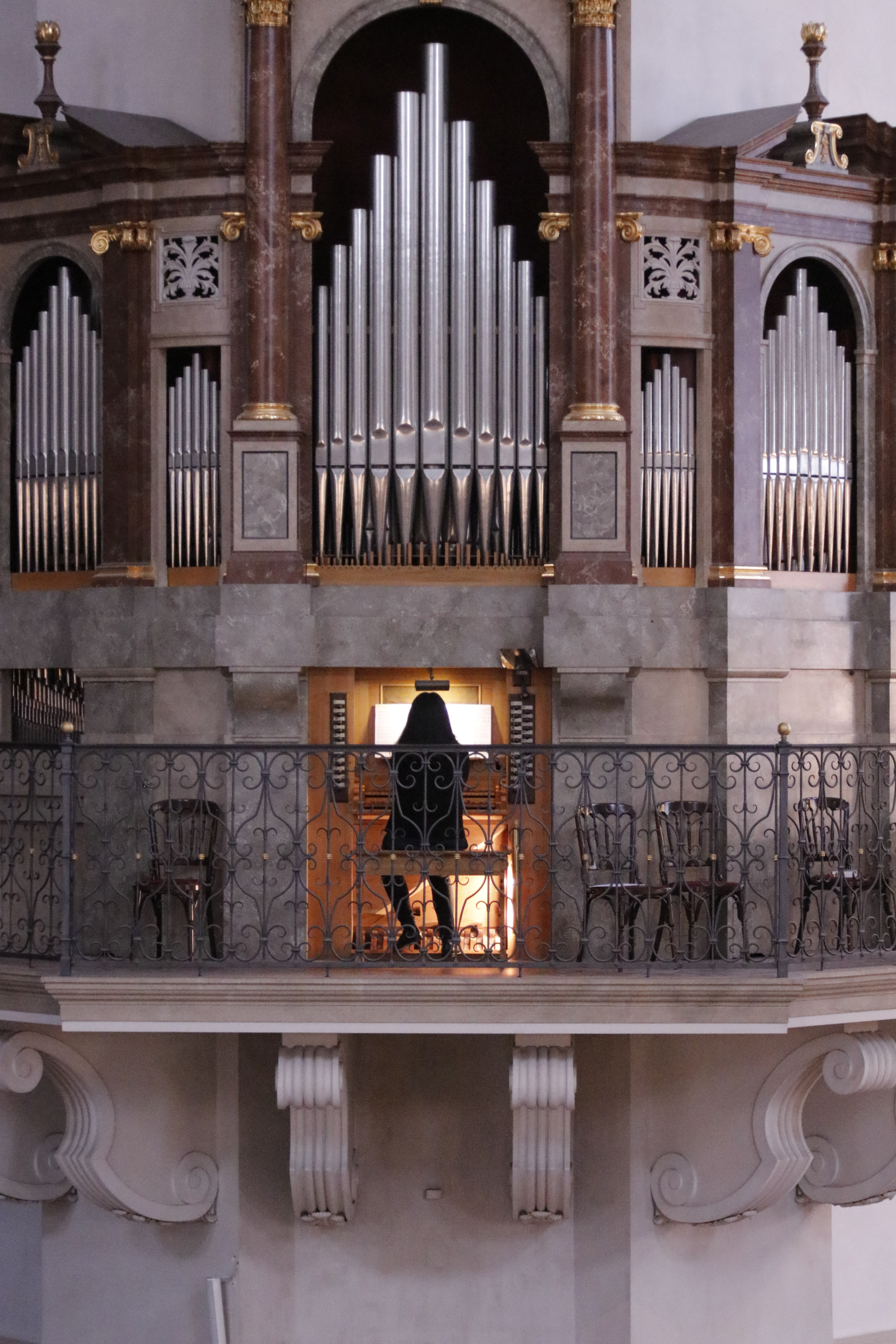 Yeonju Sarah Kim spielt an der Venezianischen Orgel (Franz Zanin 1995)